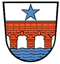 Afkomstig van Duitse Wikipedia: [1]